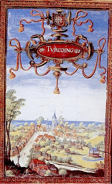 Peinture réprésentant une vue du bourg de Tourcoing au dix-septième siècle.